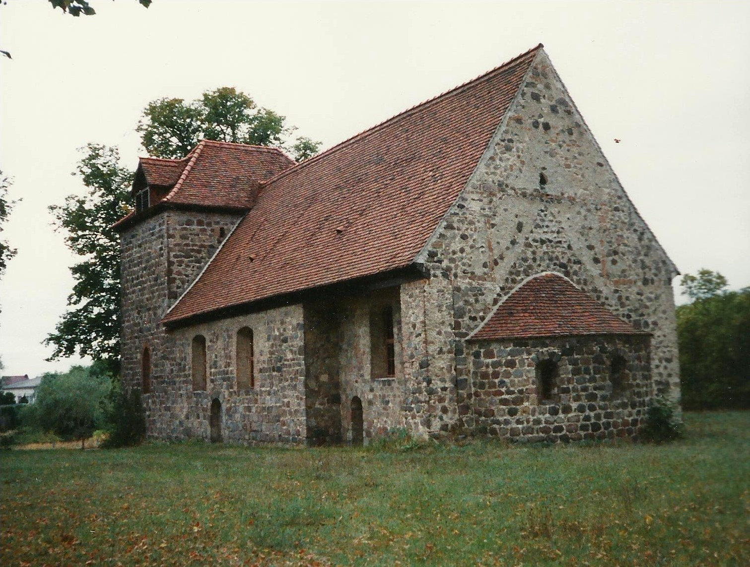 Romanische Feldsteinkirche in Michelsdorf, Gemeinde Kloster Lehnin. Die Ende des 12. Jahrhunderts entstandene Kirche steht unter Denkmalschutz.